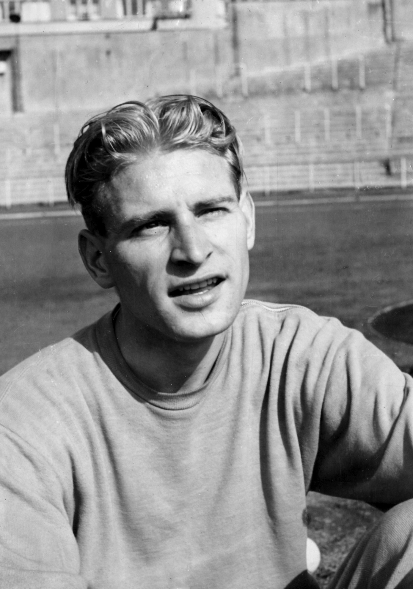 Roald Wisted-Thu under mønstringstevne Bislett 1951